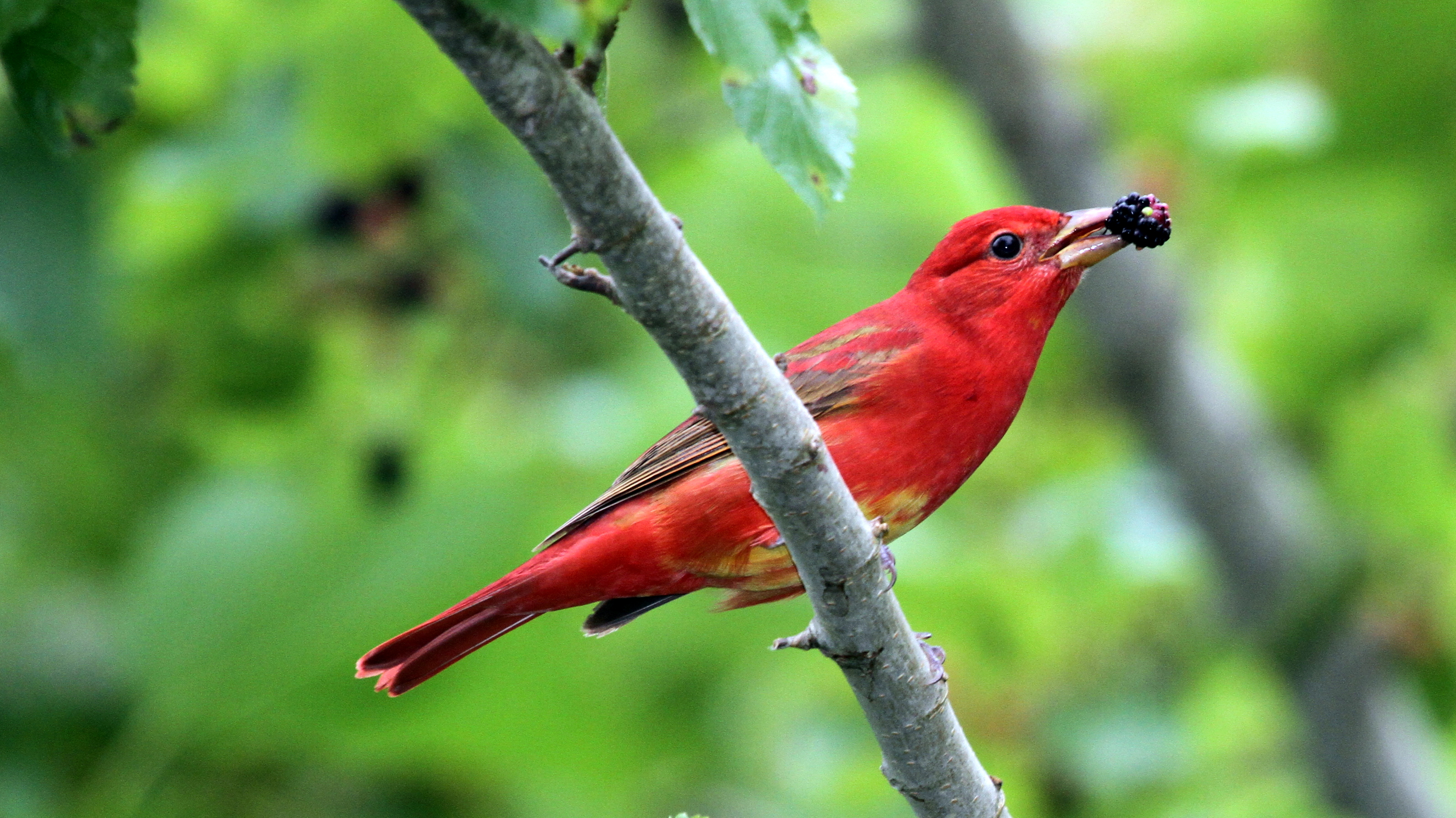 Summer Tanager